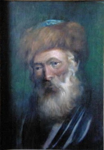 תמונה ר' ברוך הלברשטאם מגארליץ